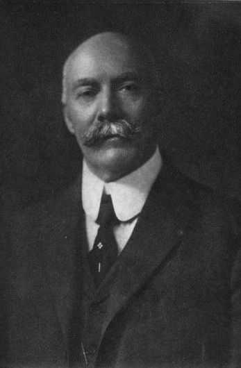 Orison Swett Marden